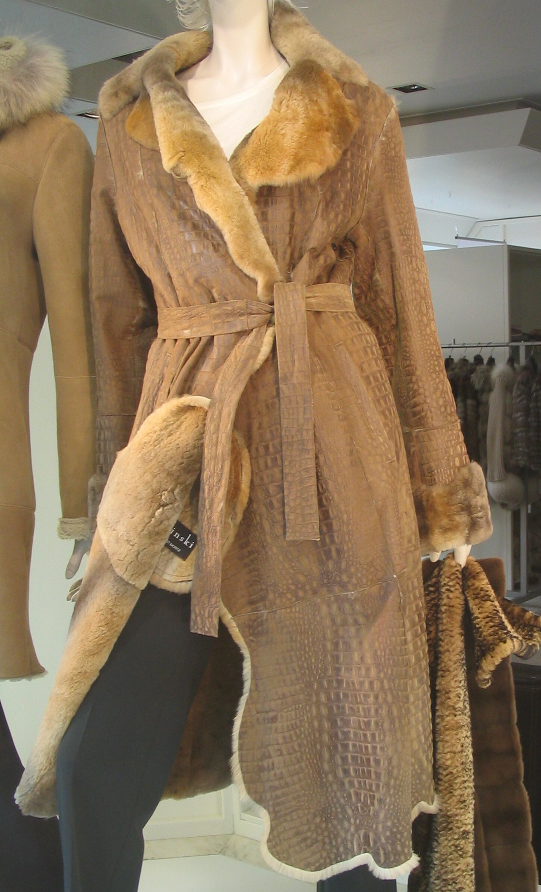 Mantel aus neuseeländischem Opossumfell (neuerdings auch: Possumfell), geschoren, gefärbt, kroko-geprägte und veloutierte Lederseite. Gesehen bei Slupinski, Düsseldorf Königsallee